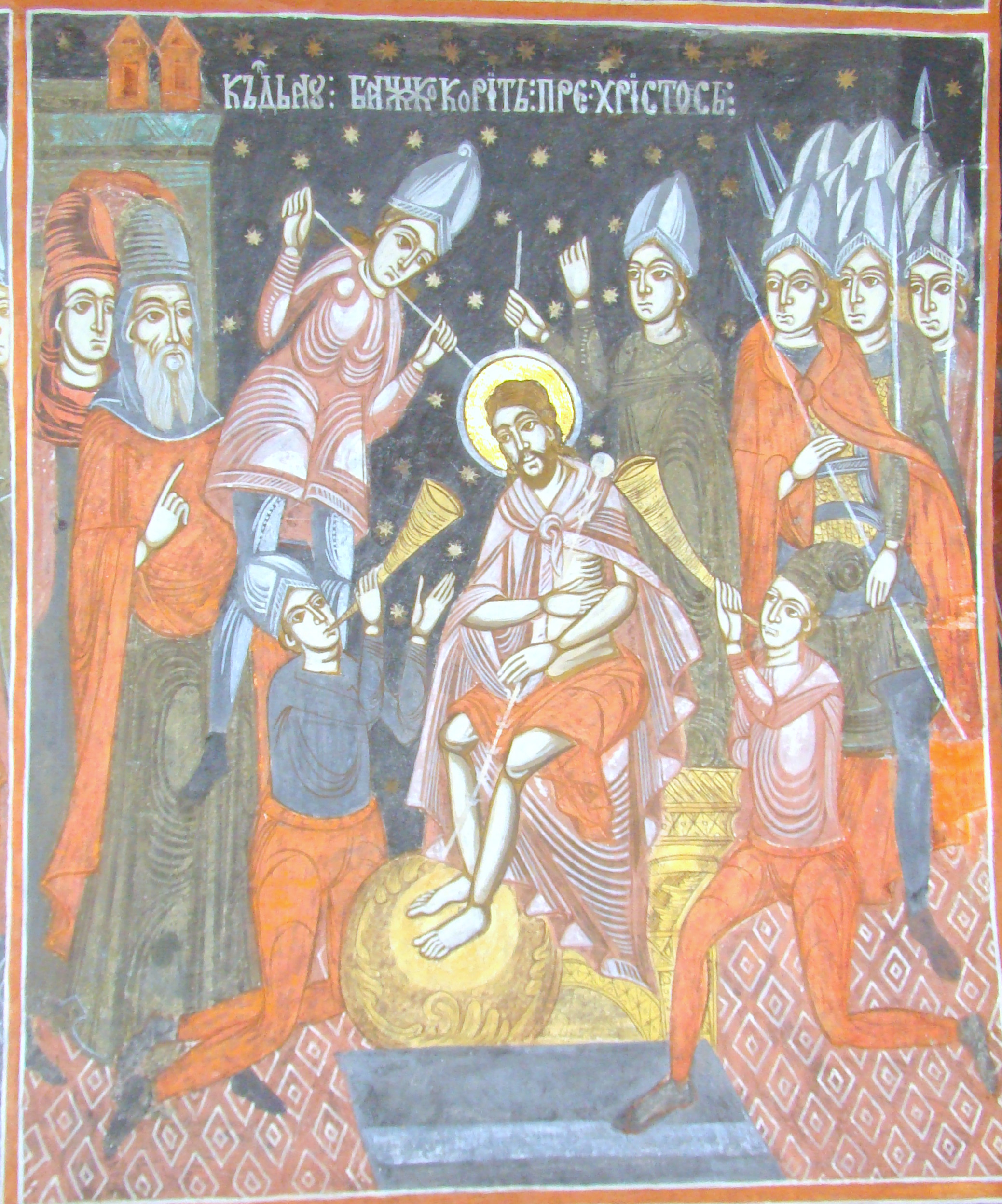 Biserica "Sf. Nicolae" din Mohu, județul Sibiu